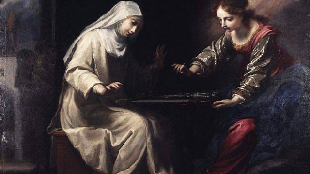 Le miracle de la broderie